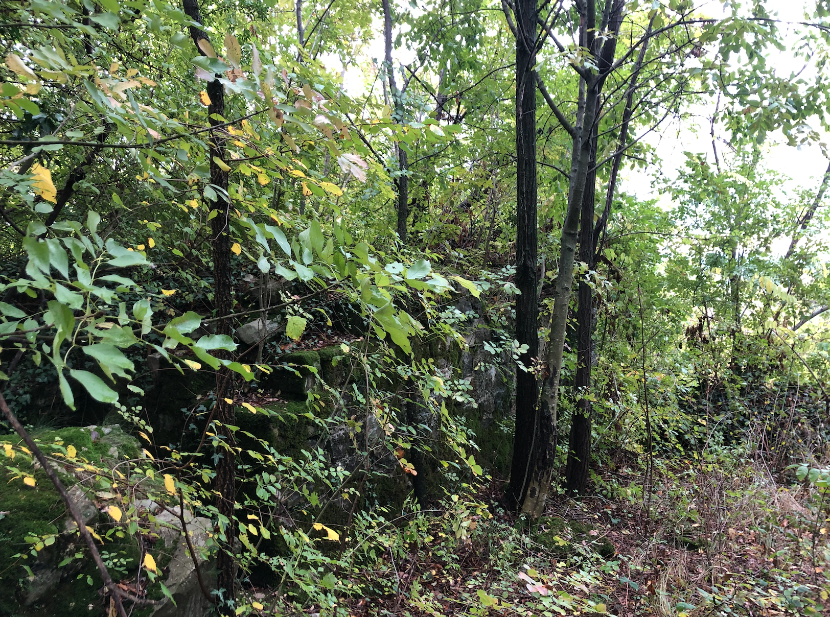 Castello di Soffumbergo - Mura